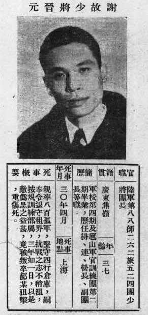 抗戰軍人忠烈錄第一輯中的烈士遺像